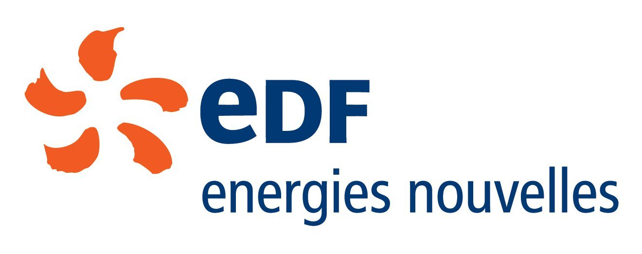 logo d'EDF EN